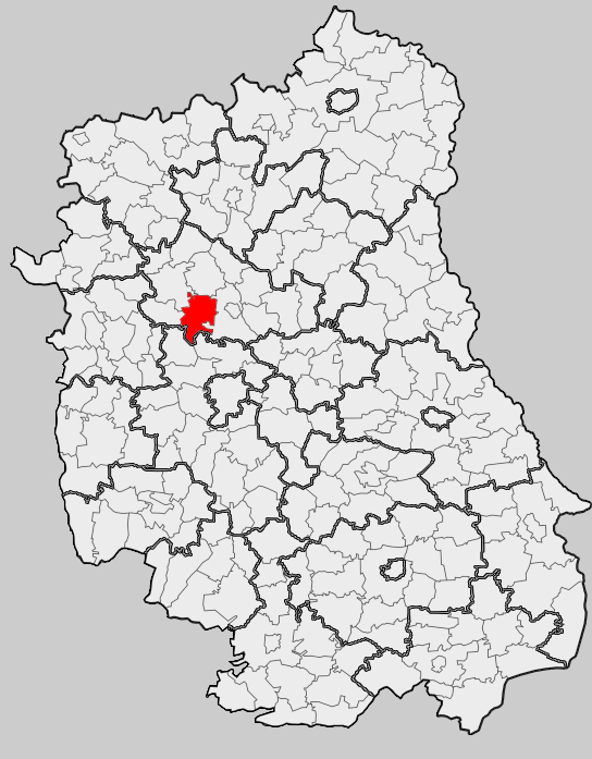 Map of gmina Kamionka, Lubartów county, Lublin voivodship Mapa gminy Kamionka, powiat lubartowski, województwo lubelskie